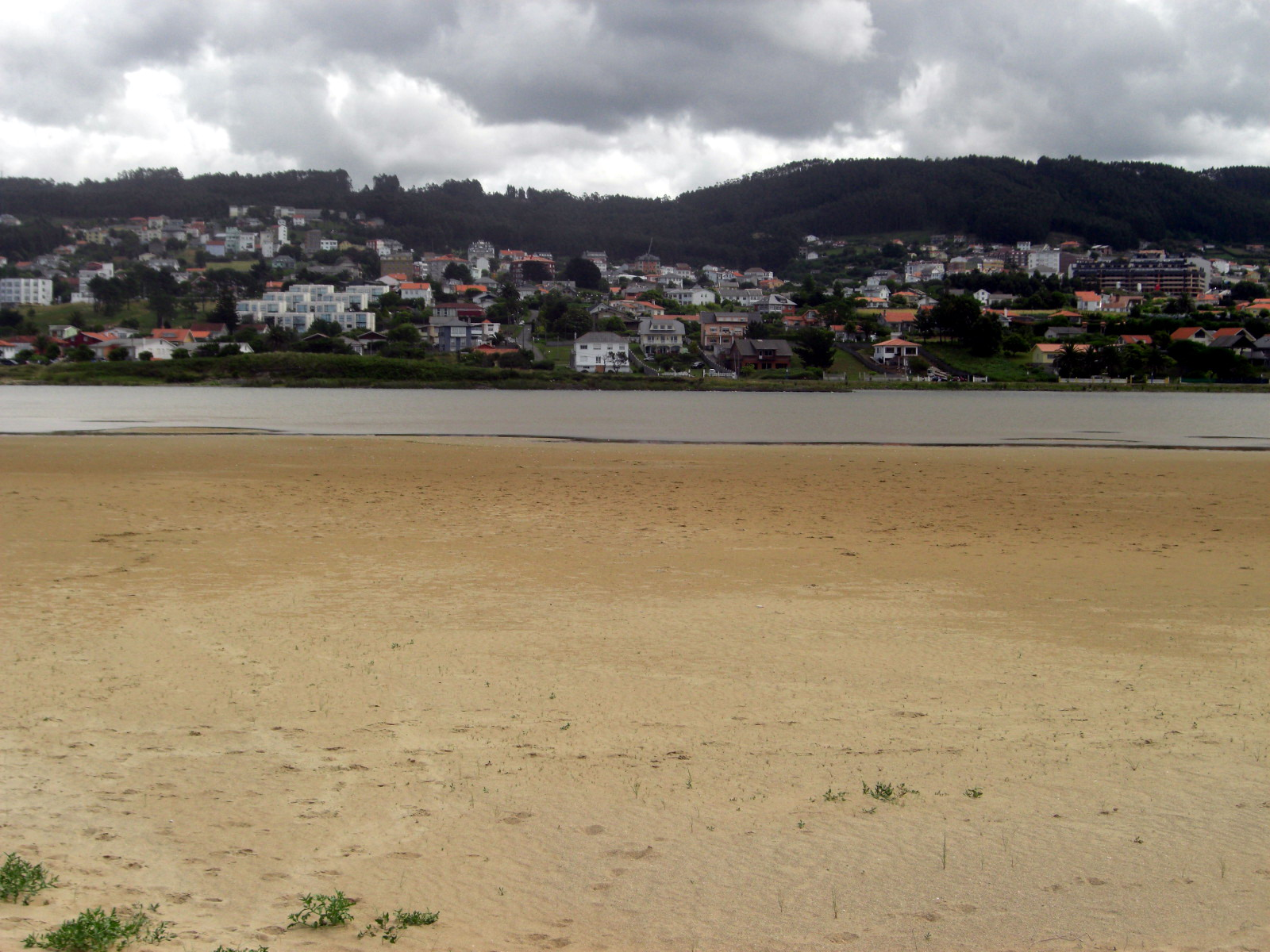 Valdoviño y Laguna de A Frouxeira.